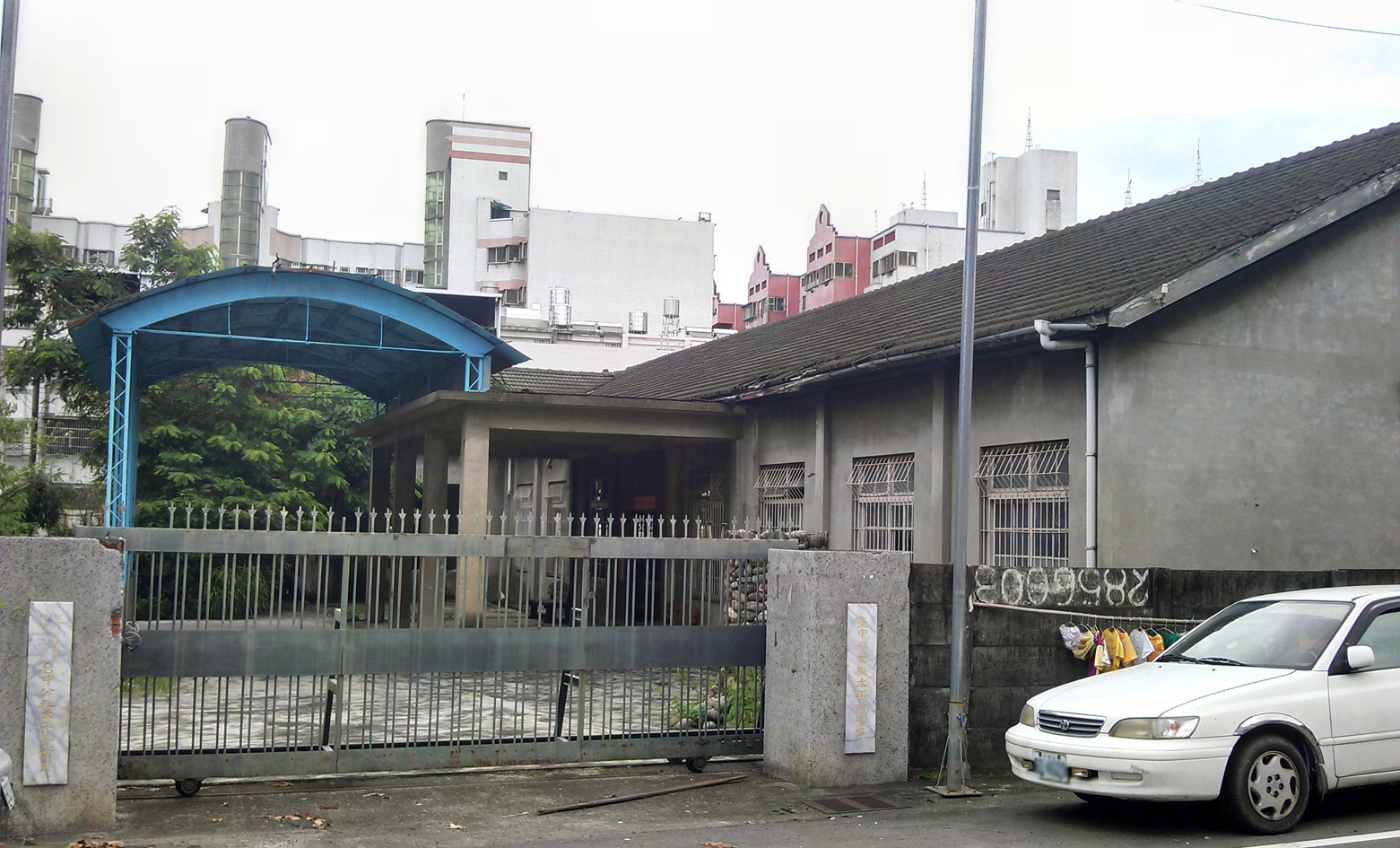 中文（台灣）: 太平買菸場